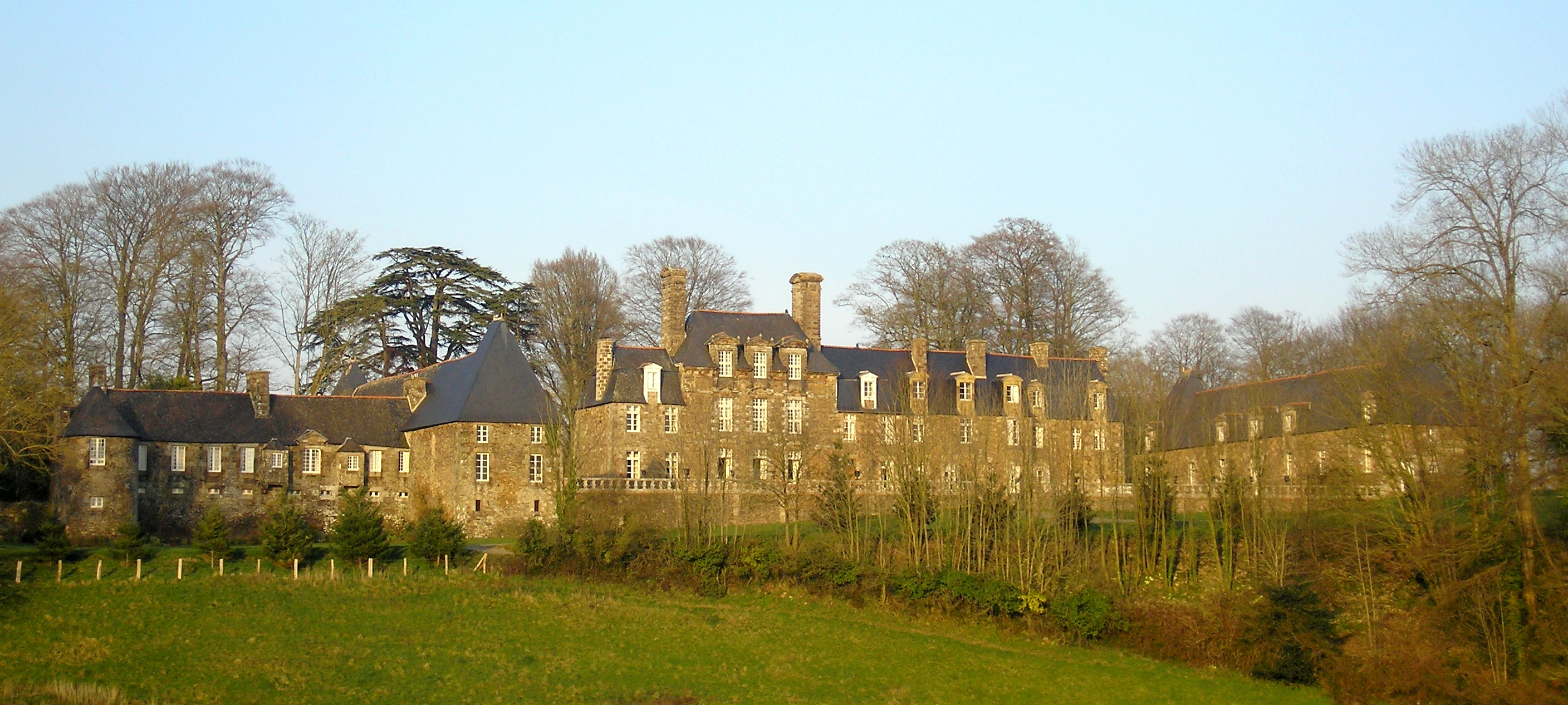 Saint-James (Normandie, France). Le château de la Paluelle.